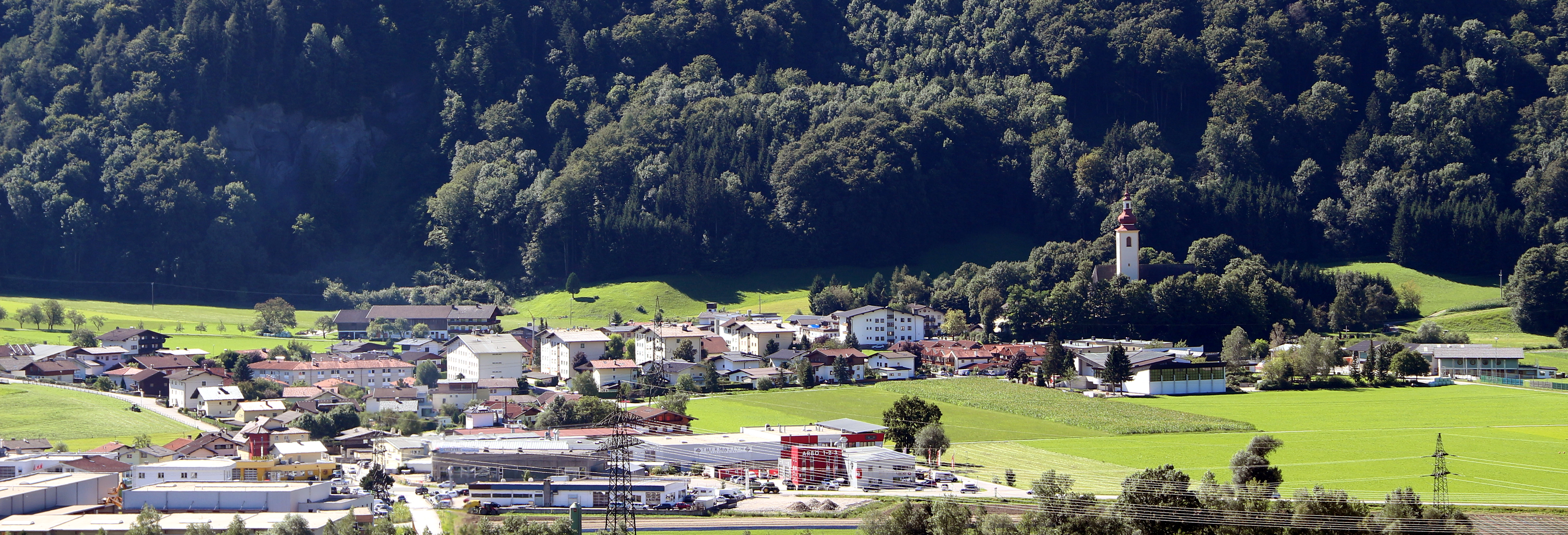 Buch in Tirol, gesehen von Norden.